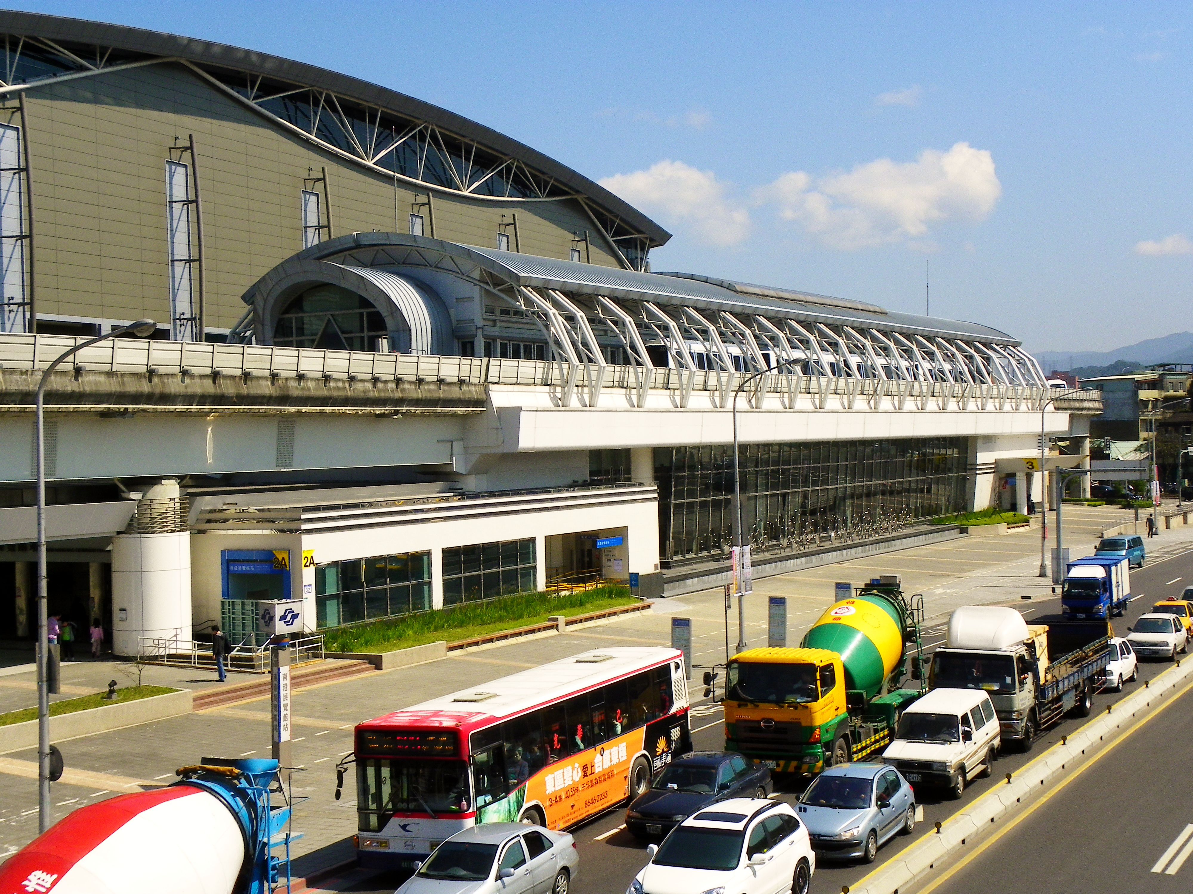 台北捷運南港線延伸開業前夕、南港展覧館駅の内湖線駅舍。